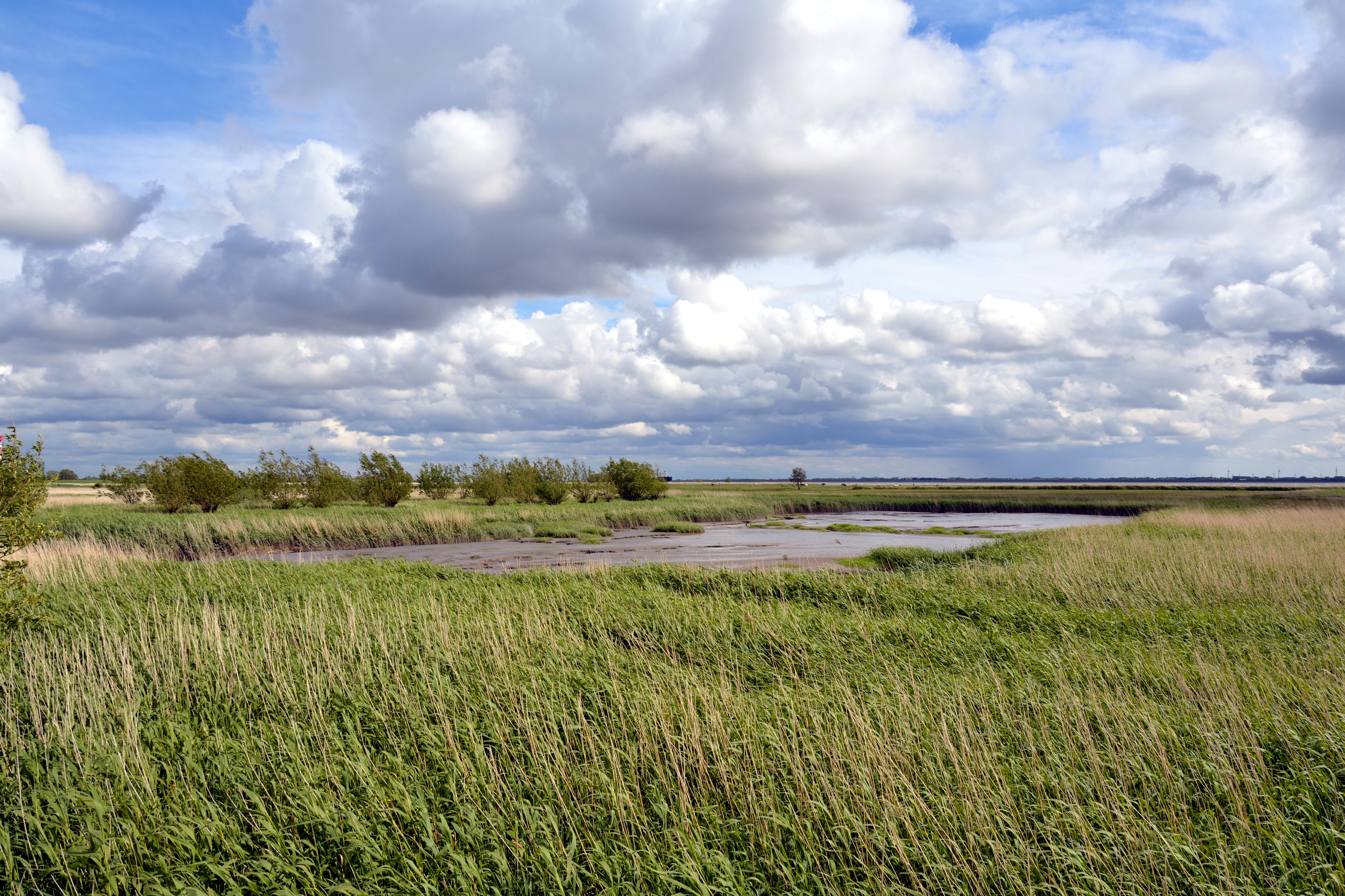 Vogelschutzgebiet in Schleswig-Holstein im Kreis Steinburg Impressionen des Gebietes "Vorland St. Margarethen"